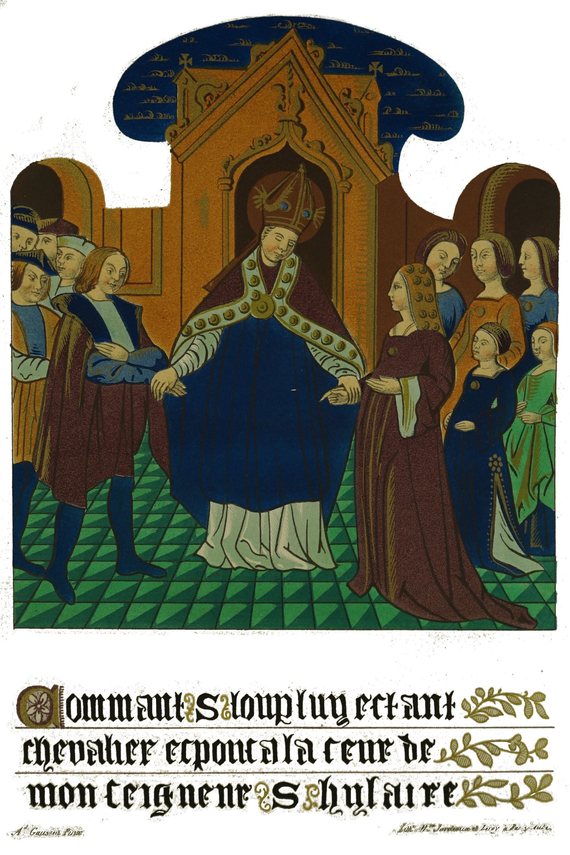 dessin des émaux.